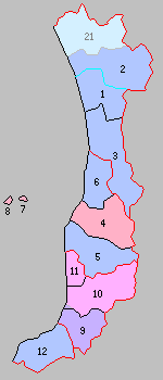 北海道増毛支庁の町村。